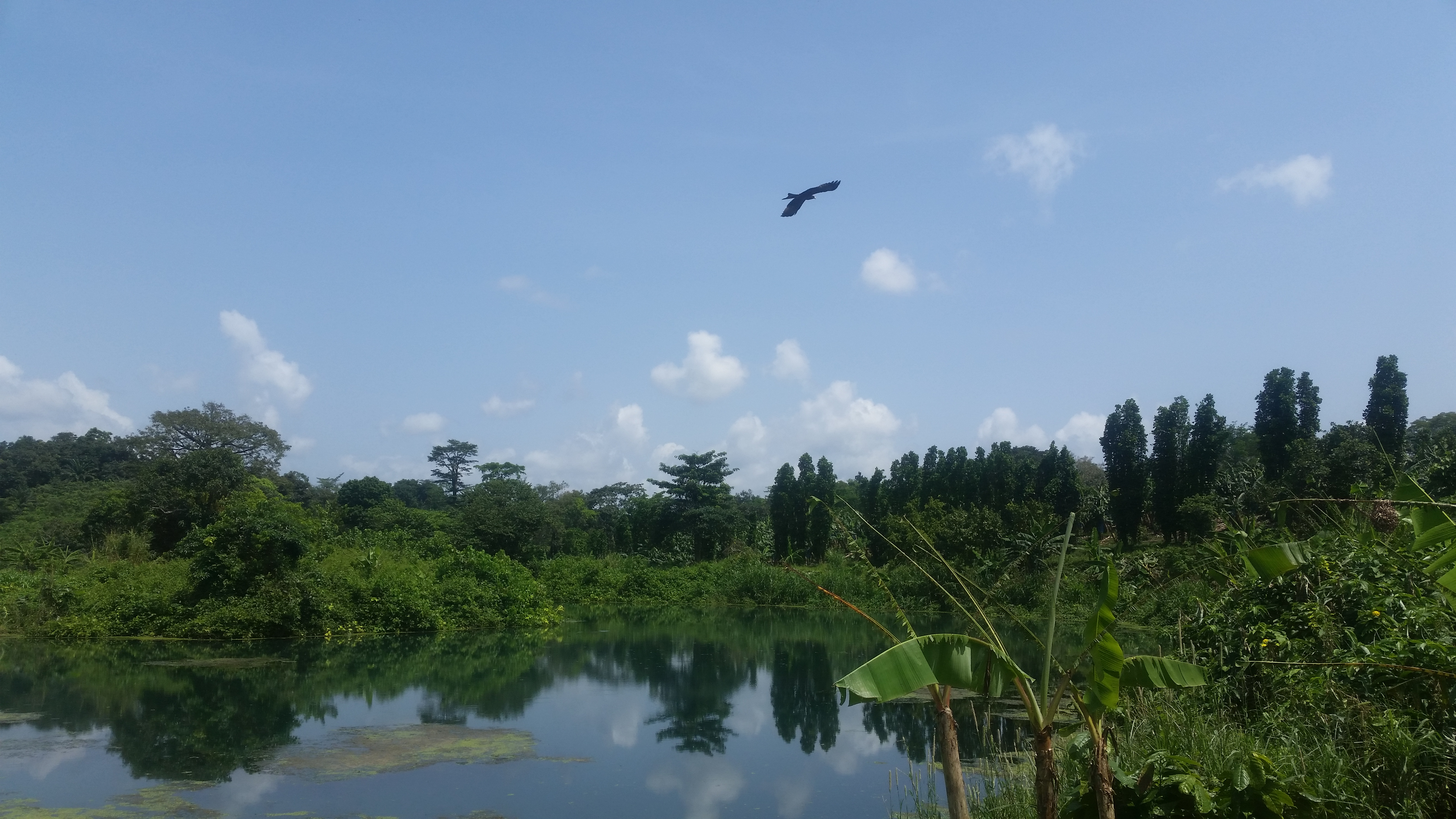 Ce lac a été créé il y 12 ans par la société PHP afin de servir de point de captage pour le pompage pendant les périodes d'irrigation. Mais il est très vite devenu un point d'attraction pour la ville à cause de la beauté de ses eaux et de sa végétation.